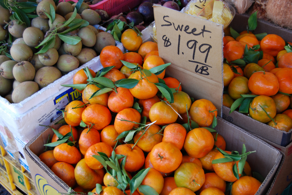 sweet